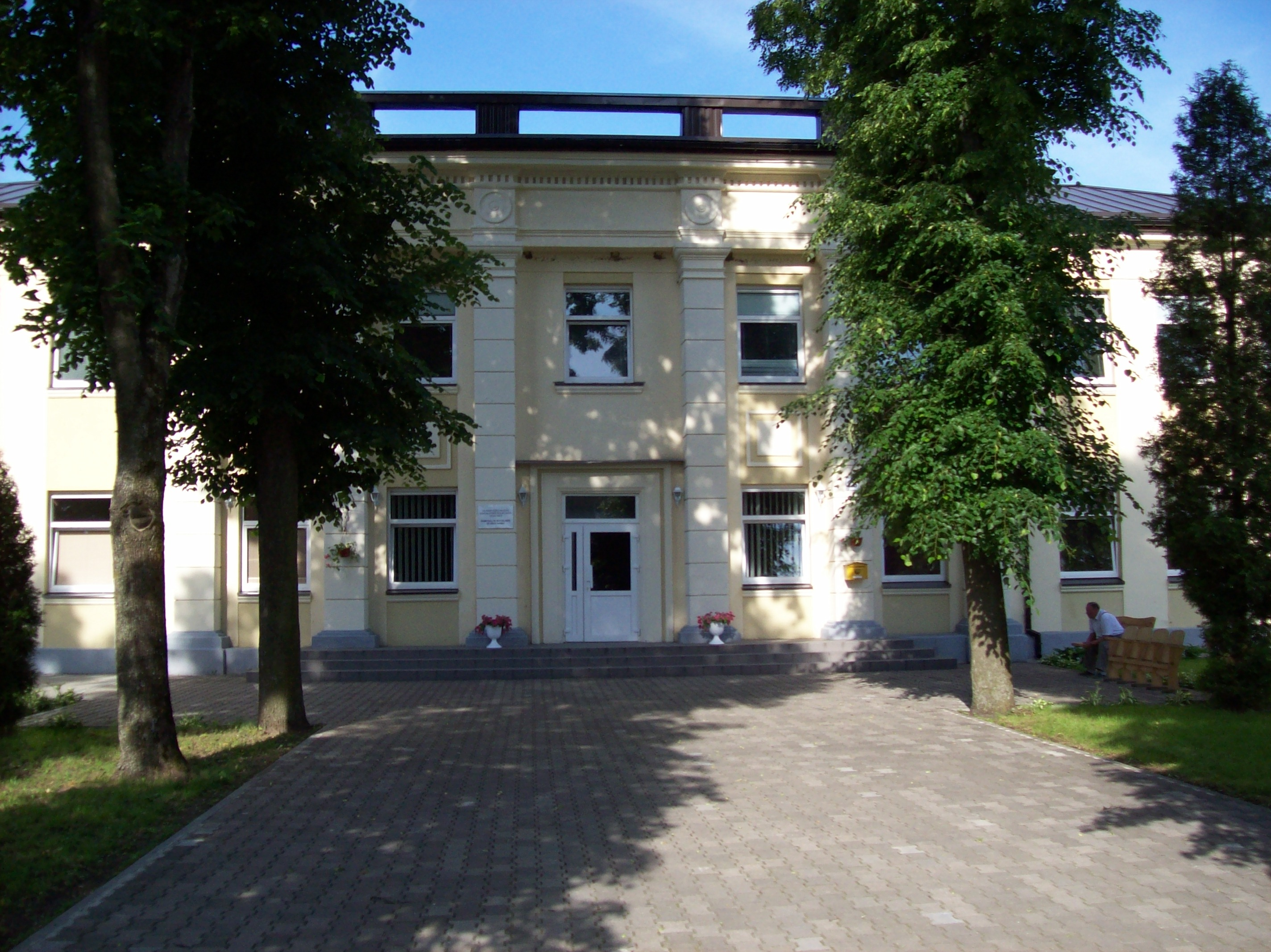 Ramygalos miestelio ligoninės ir vaistinės pastatas